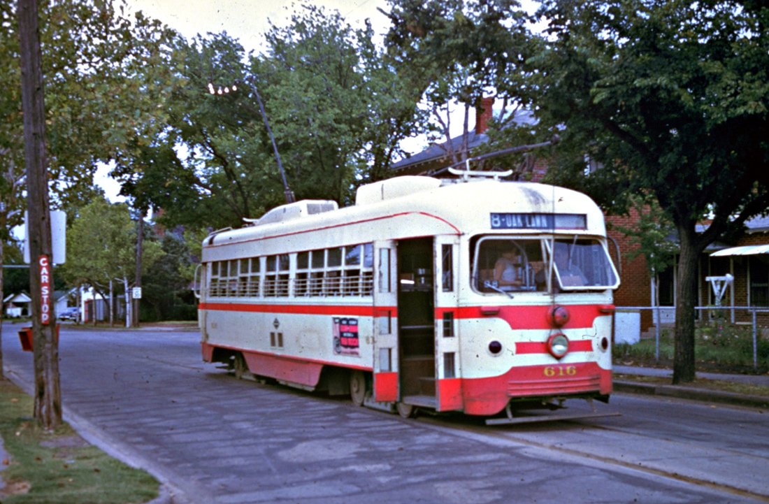 Tram in Dallas, Texas, c. 1948